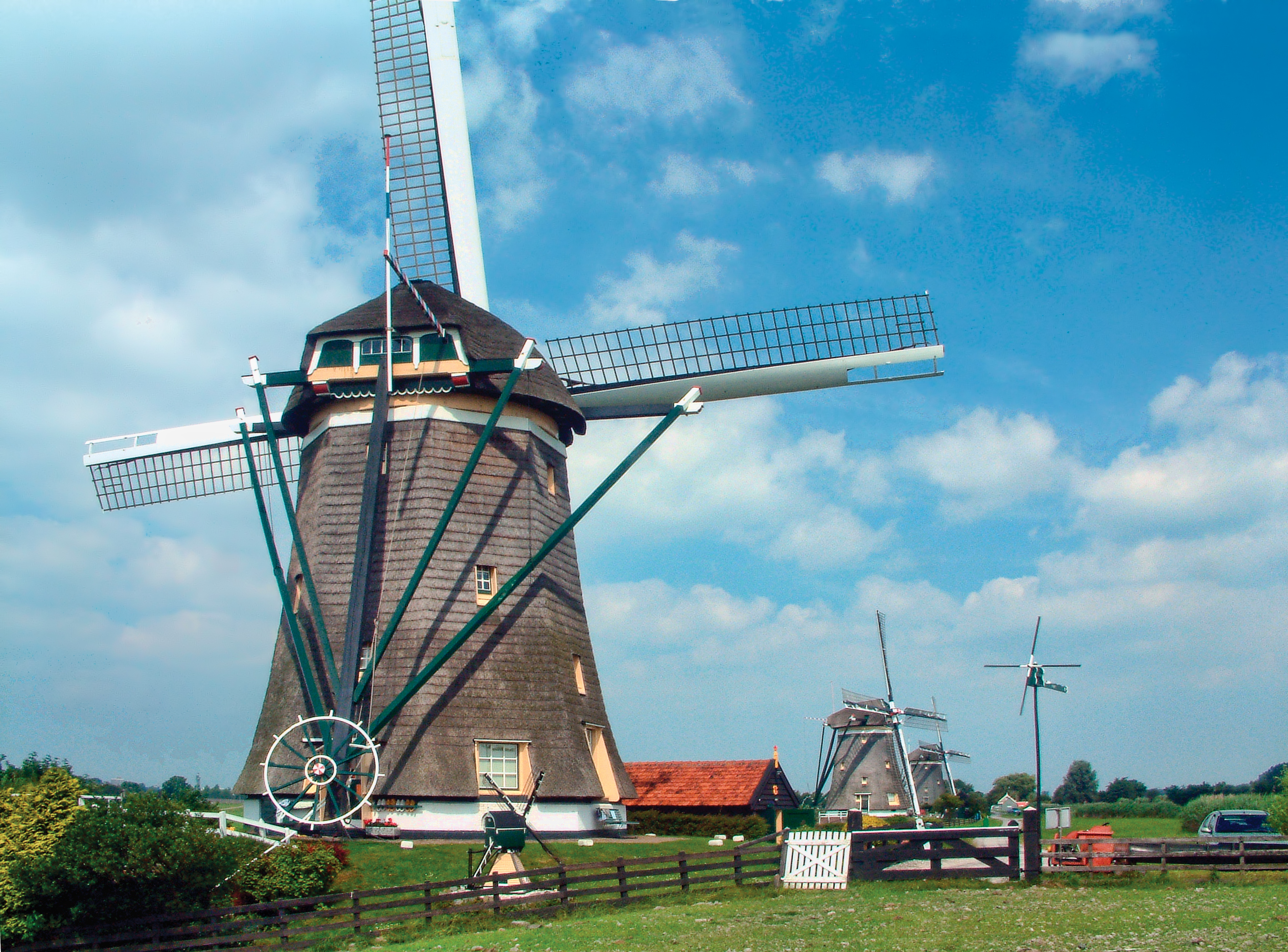 Driemanspolder 8-kante grondzeiler molens Bouwjaar 1672 / Vlucht 28.20 meter Leidschedam / Eiganaar Provincie Zuid-Holland ondermolen (voor)